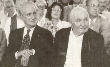 Johannes Rau und Walter Wohlfeld auf Wohlfeld´s 80 Geburtstag